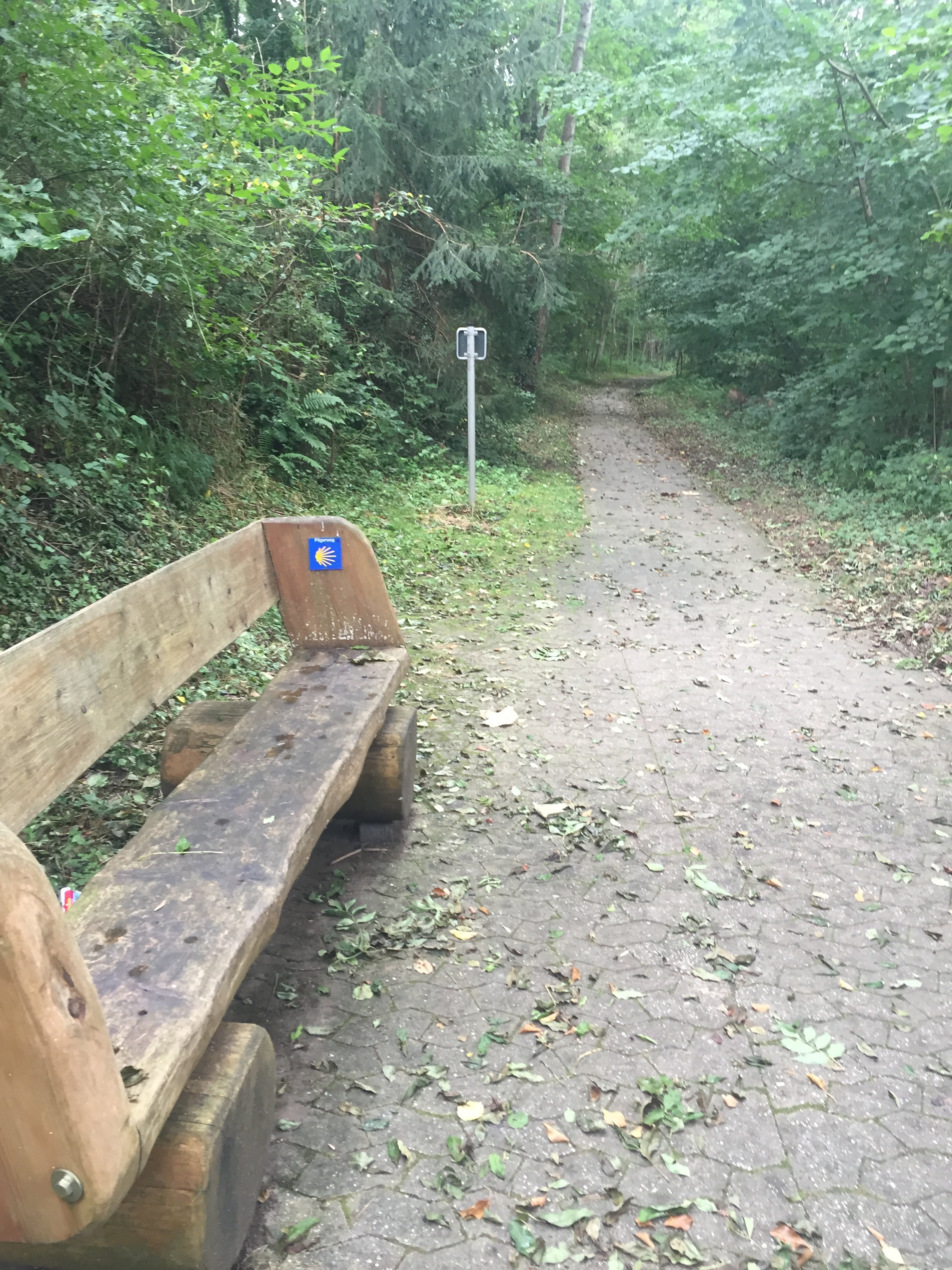 Banco con motivos jacobeos a la salida de Bollendorf.